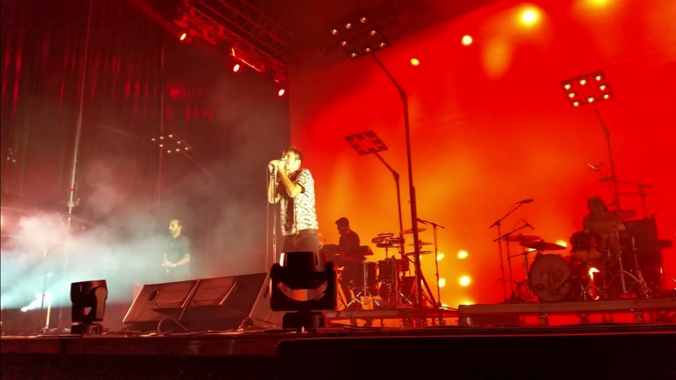 Concierto de Vetusta Morla durante el Festival Sonorama Ribera 2015 Aranda de Duero Burgos Sábado 15 Agosto 2015